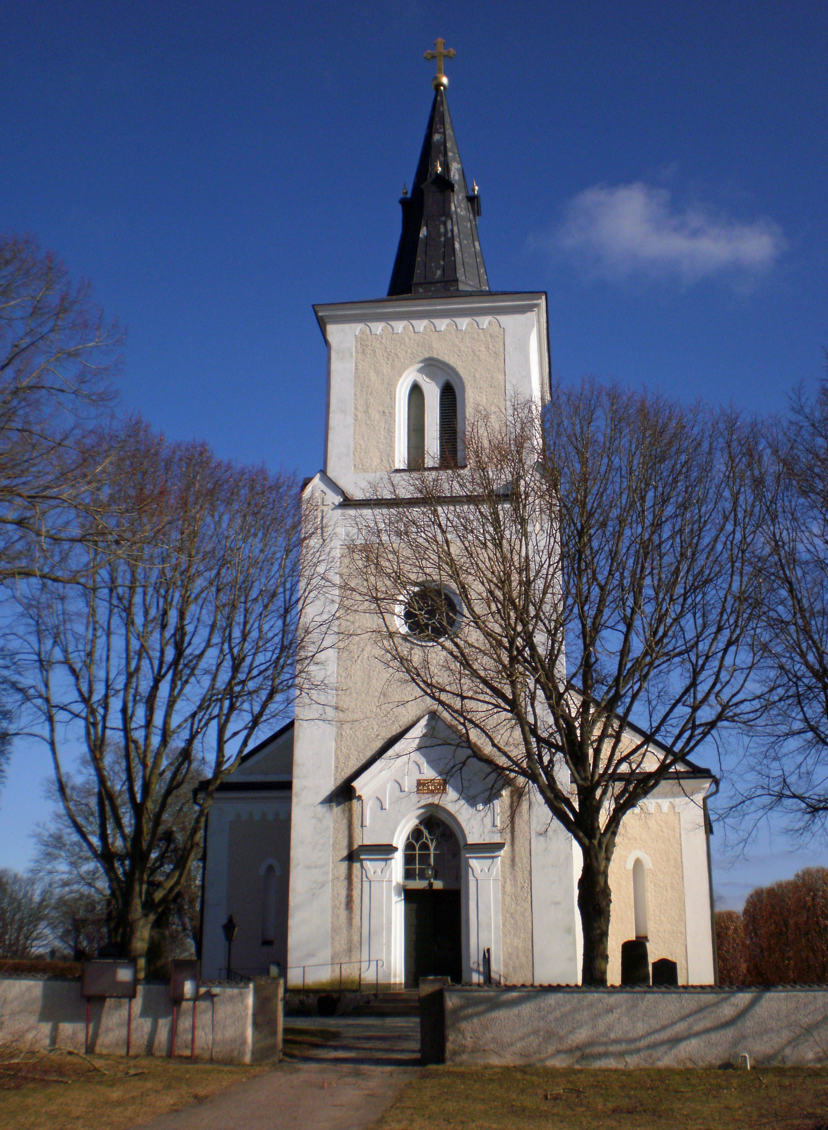 Förlösa kyrka